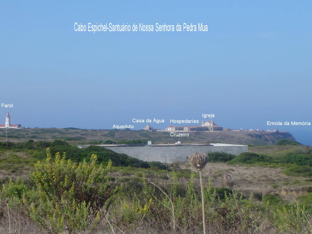 Cabo Espichel - Santuário de Nossa Senhora da Pedra Mua 2005